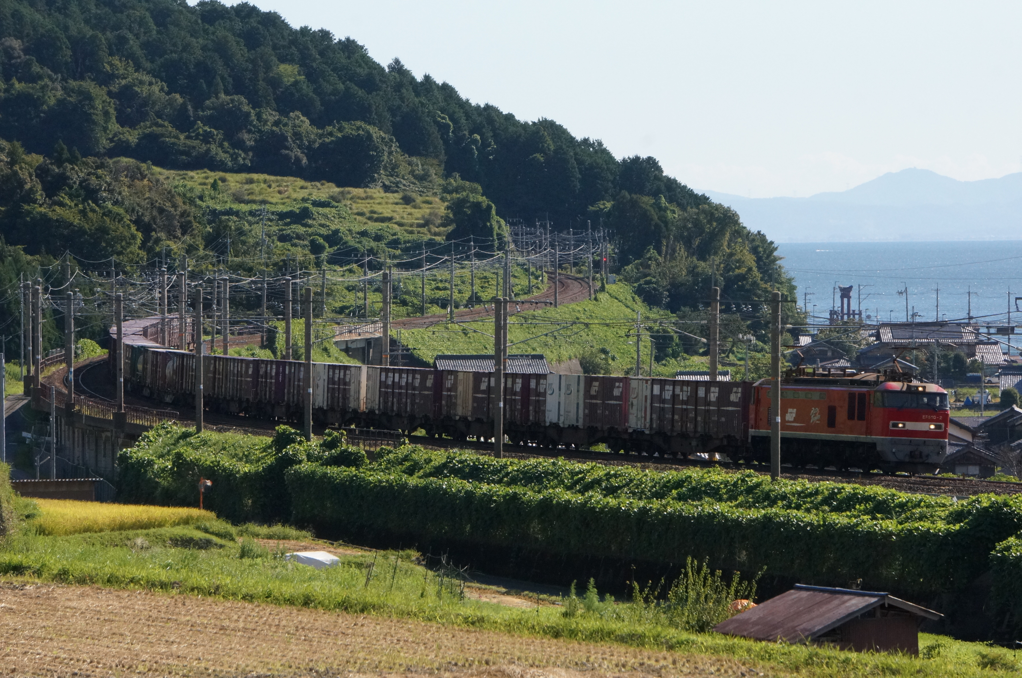 3096レ？